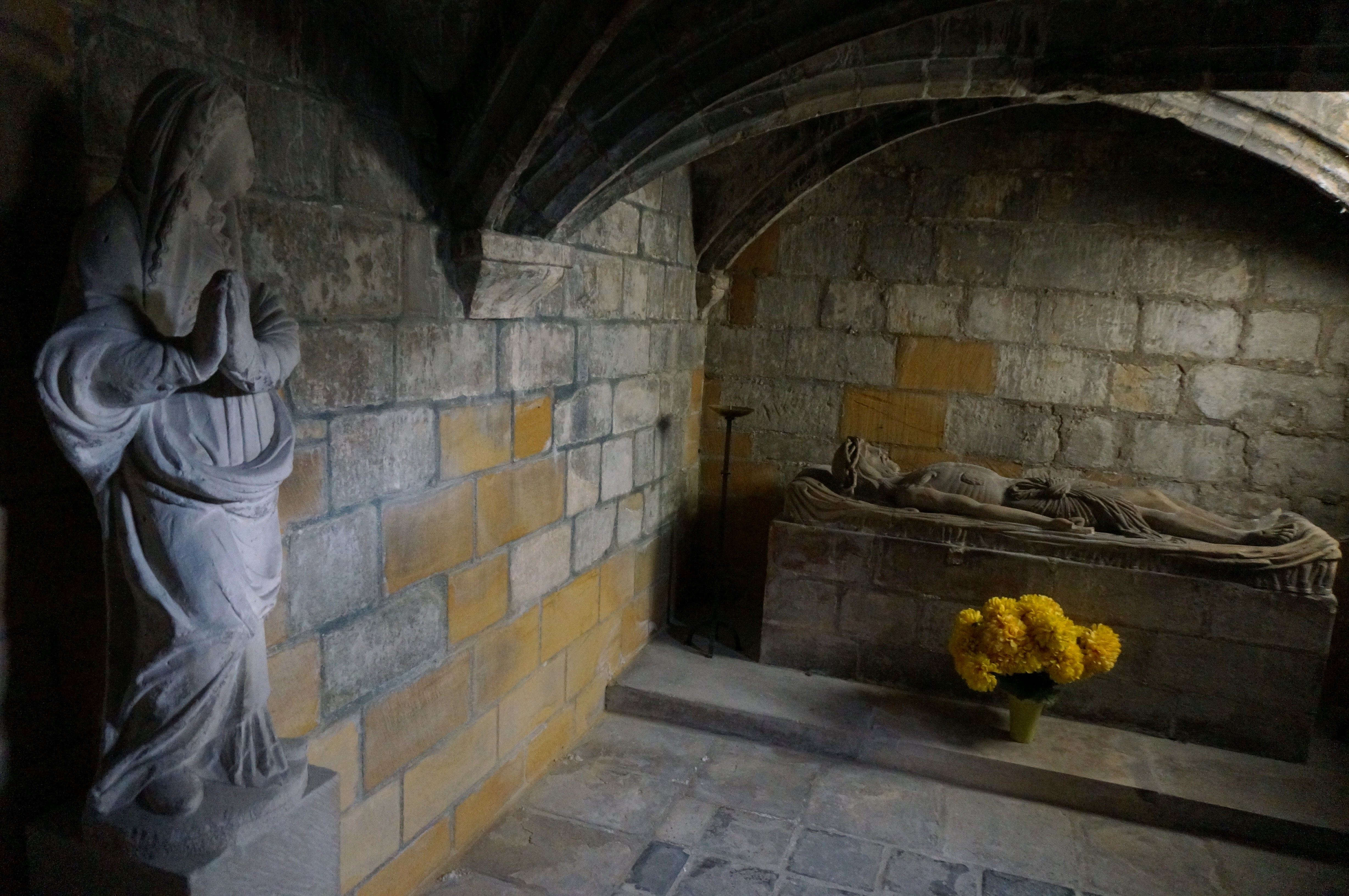 Dans la crypte, deux femmes et le Christ.